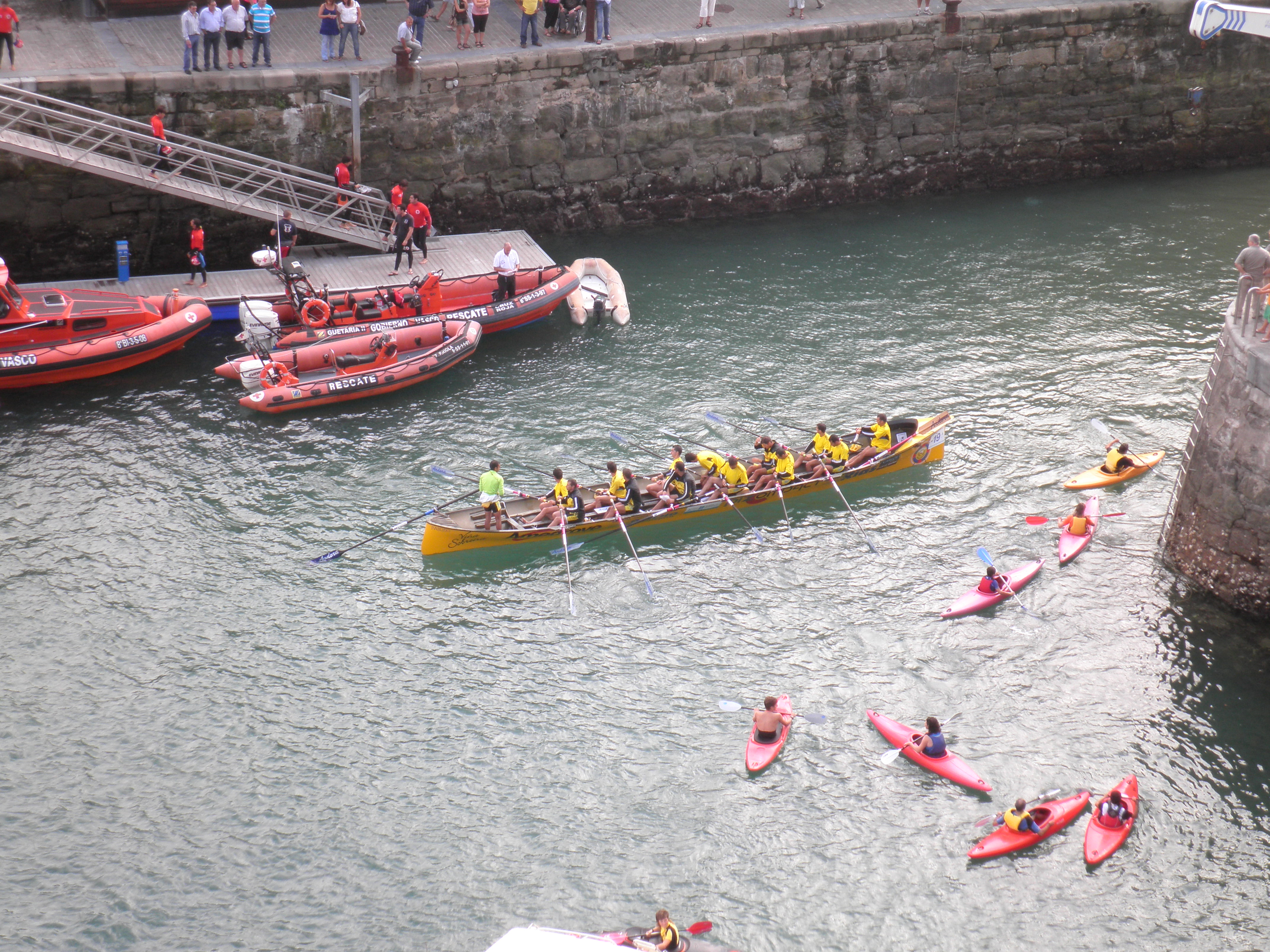 Donostiako bandera, 2010.